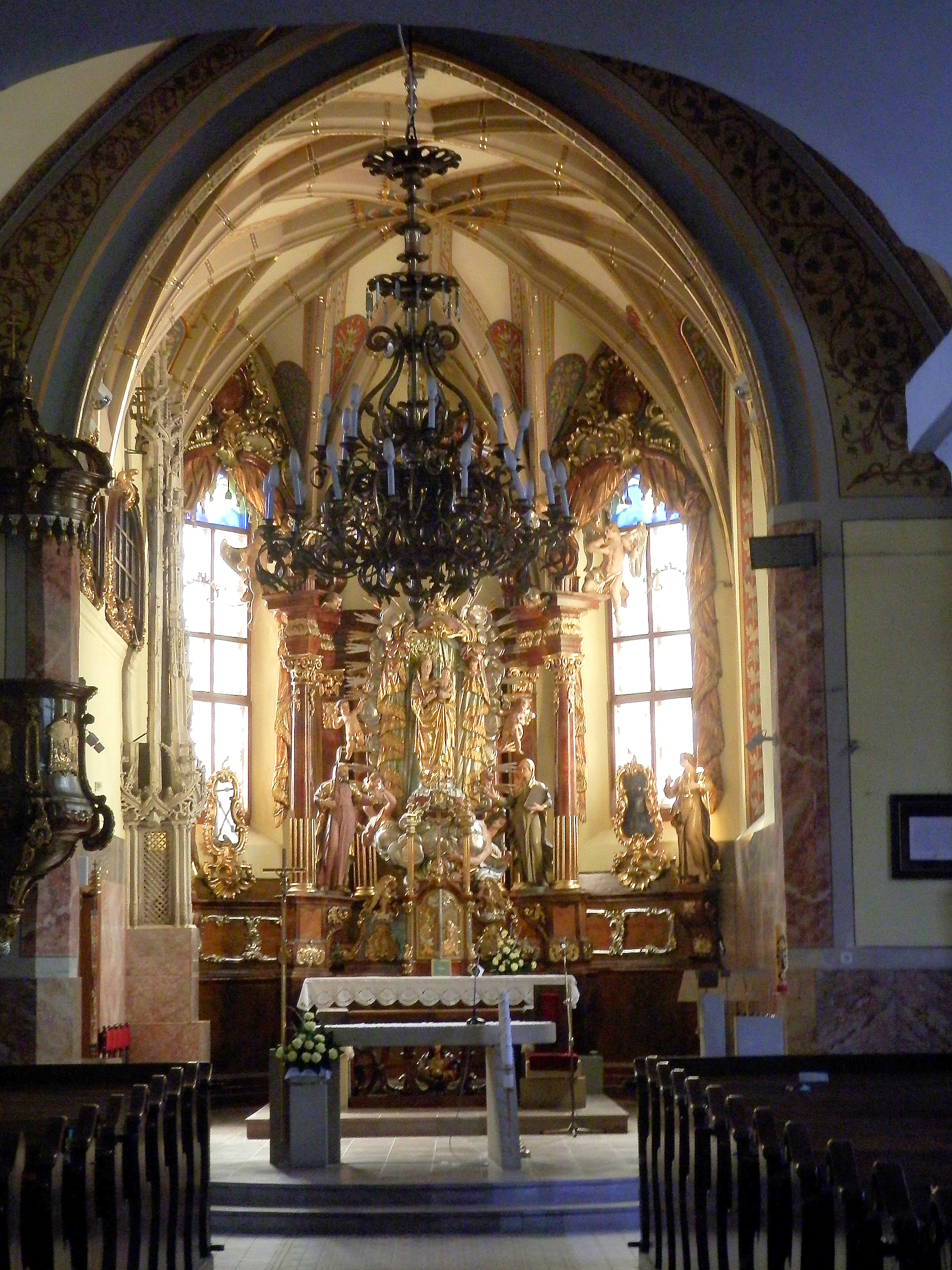 Interiér.Bazilika Navštívenia Panny Márie v Starých Horách je rímskokatolícka bazilika minor. Kostol bol postavený v rokoch 1448 – 1499. Na jeho hlavnom oltári sa nachádza socha Panny Márie. Za baziliku menšiu bol kostol vyhlásený 1. augusta 1990.